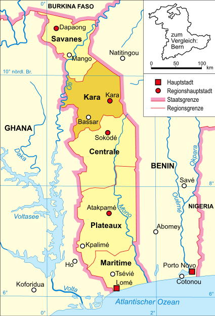 Politische Karte Togos (Region Kara hervorgehoben)